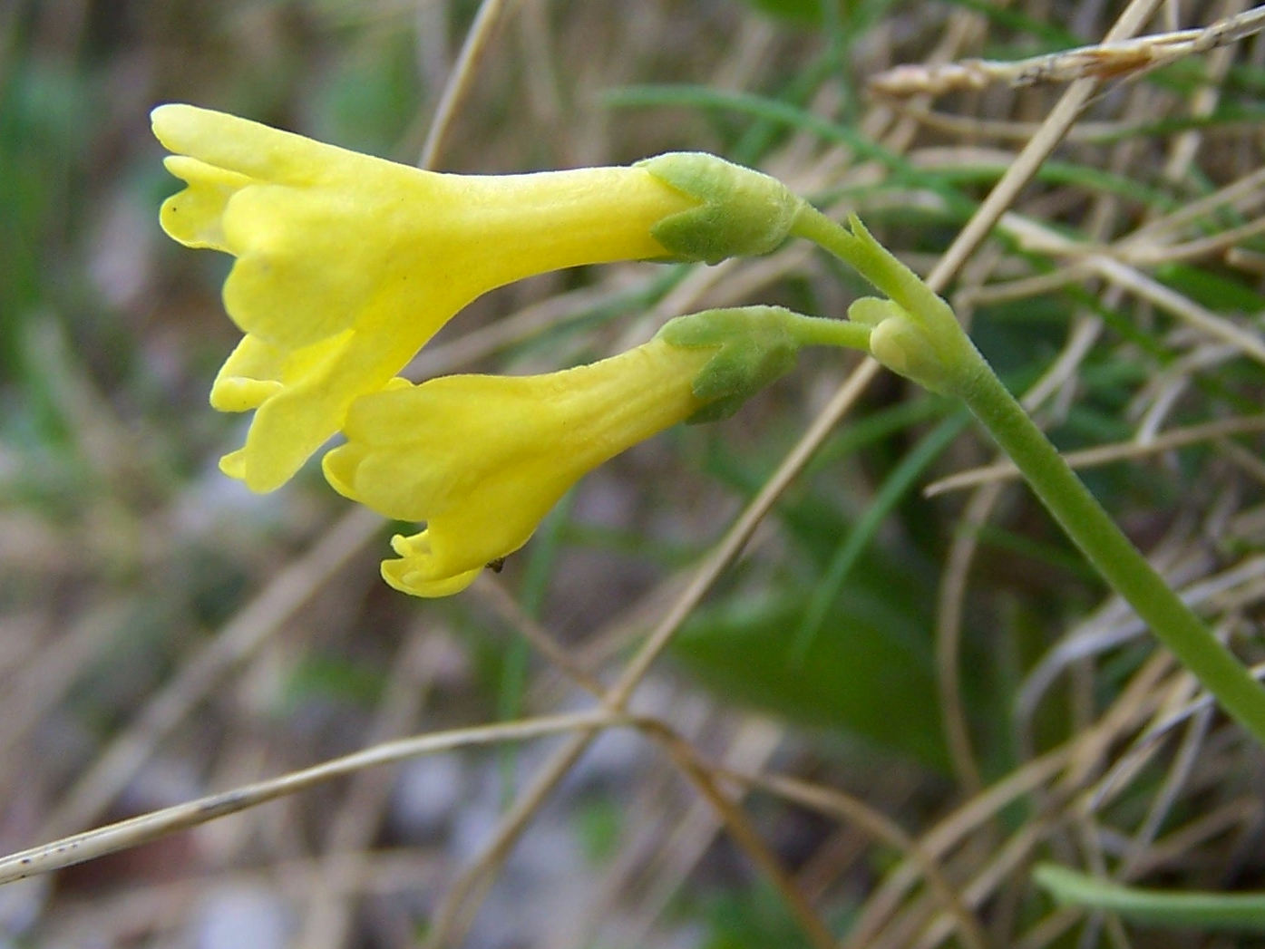 Primula auricula (Tatra Mountains, Hala Upłaz)